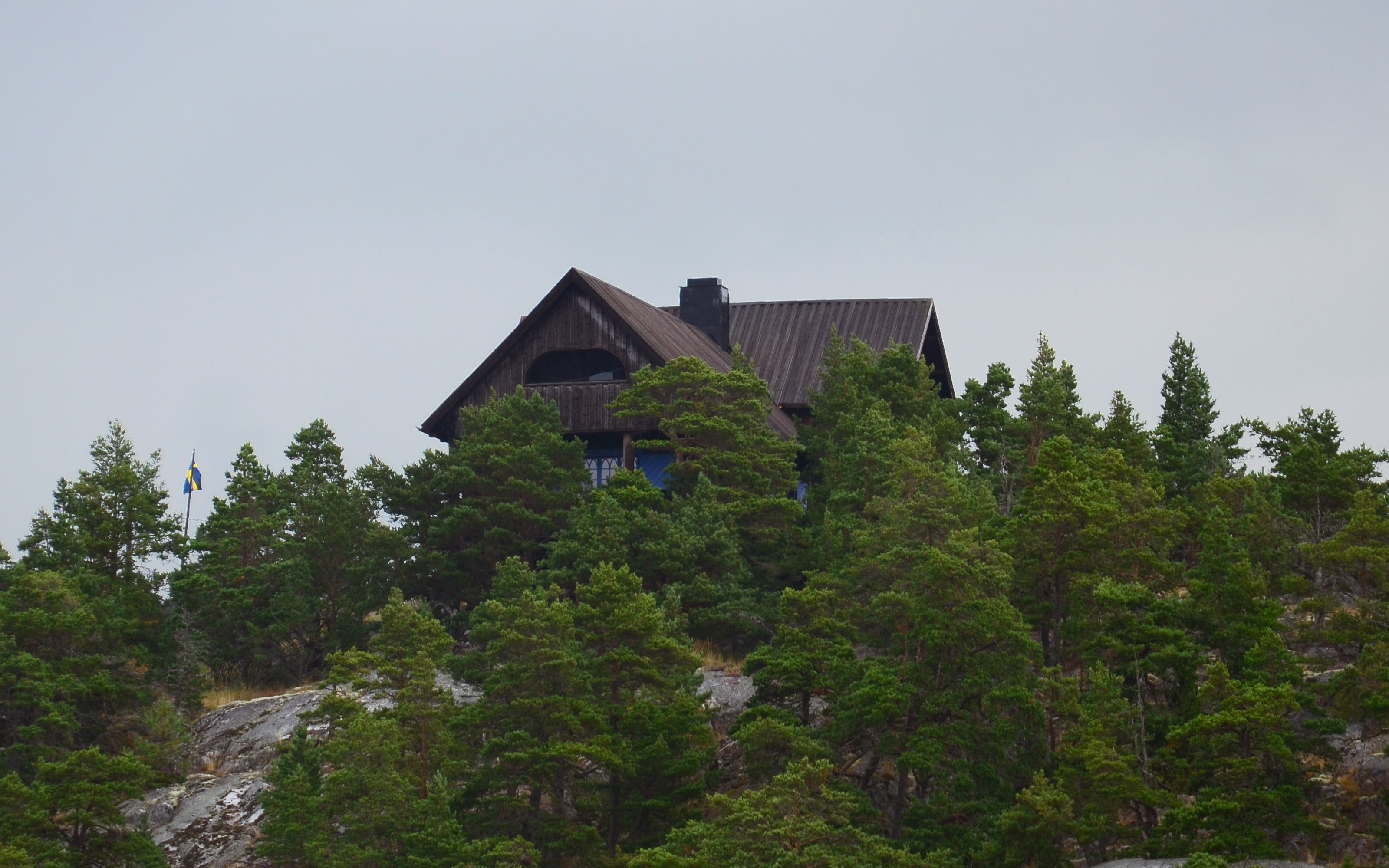 Jaktstugan på Mörtö-Bunsö i Stockholms skärgård.